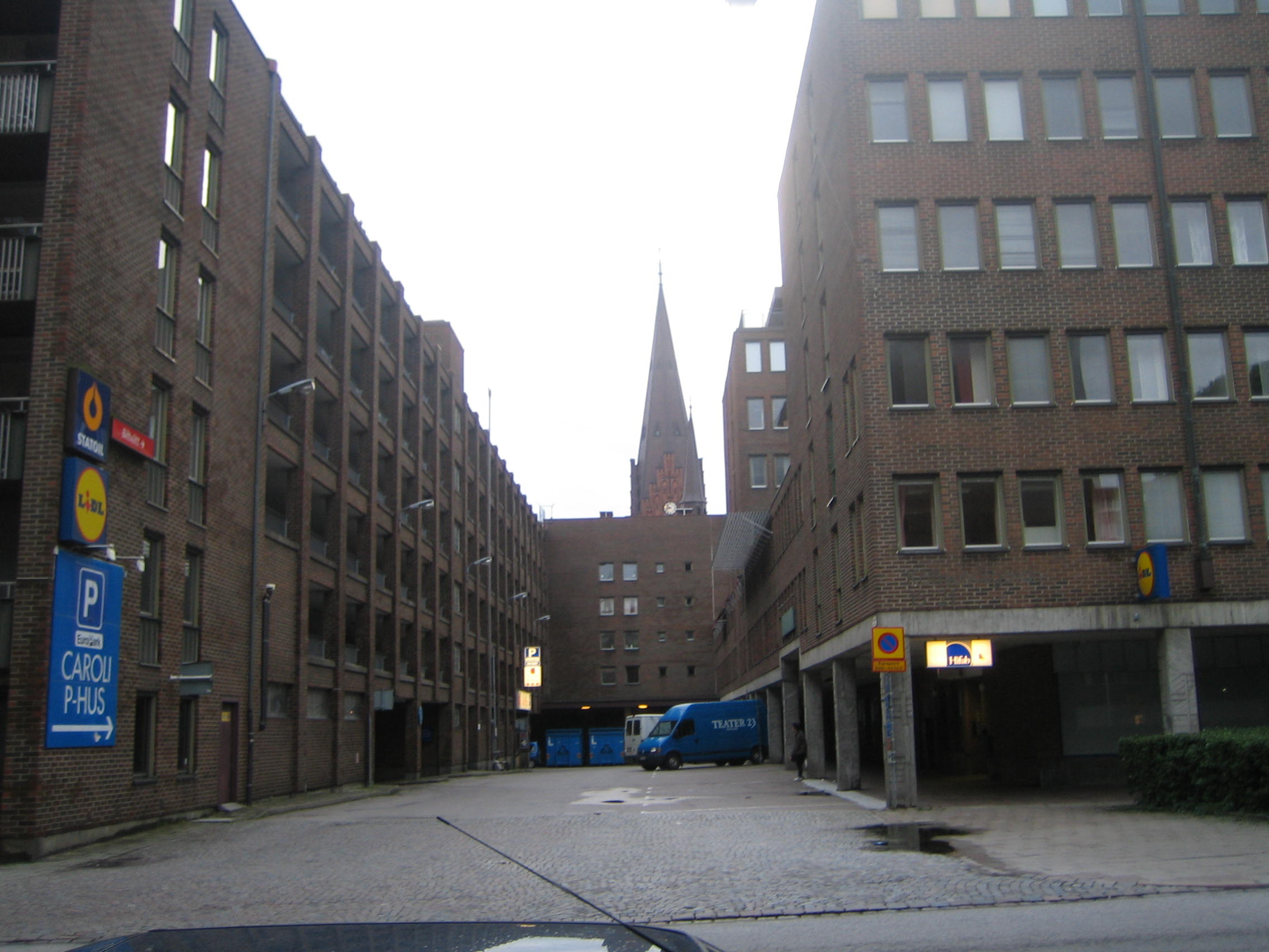 Denna bild tagen vid Kattsundsgatan visar tydligt hur byggnaderna som fick ersätta de äldre husen ser ut. På platsen låg tidigare Mårtensgatan (med anor från 1200-talet) och Ringaregränd.